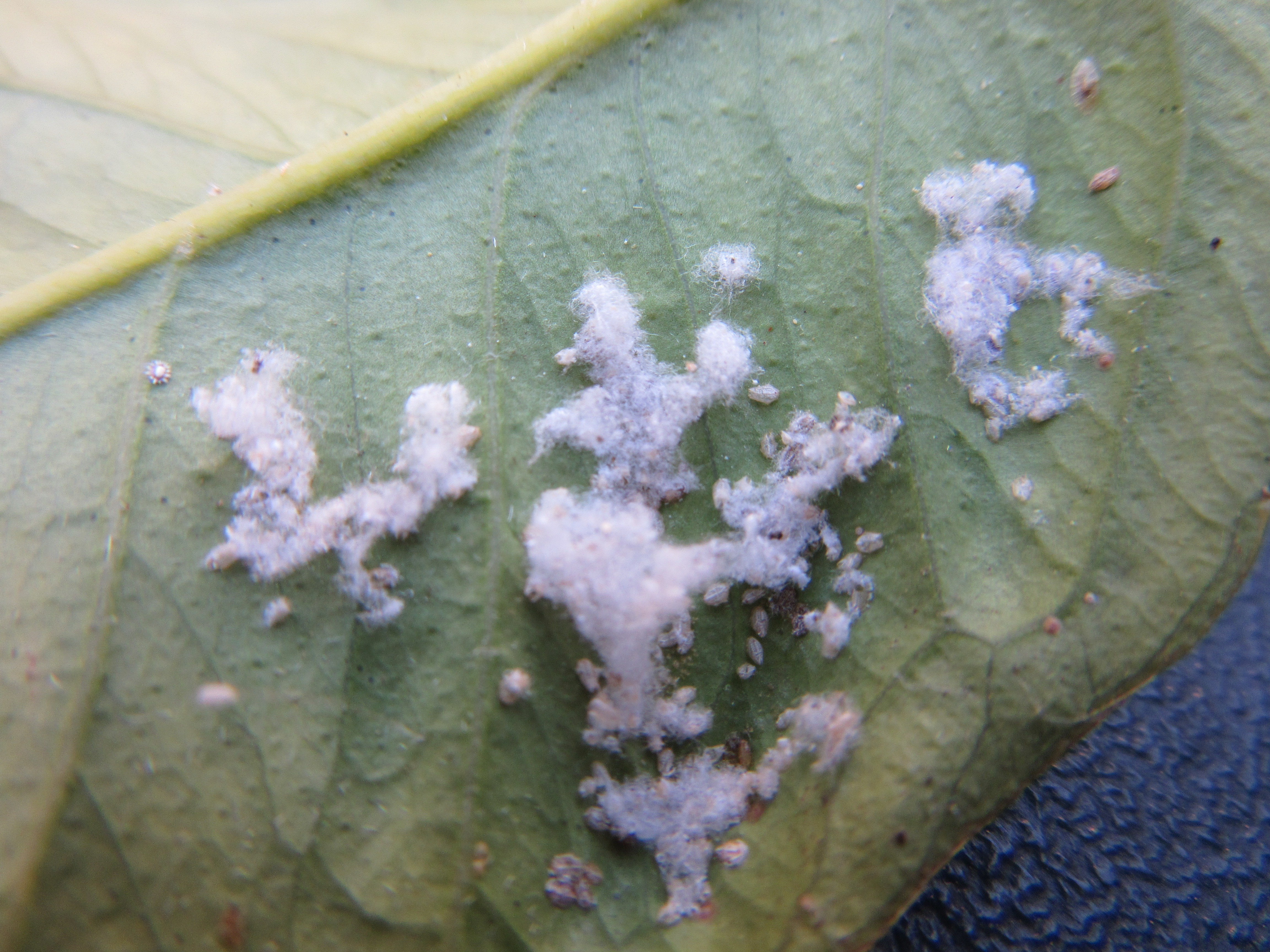 Aleurothrixus floccosus sobre hoja de limonero